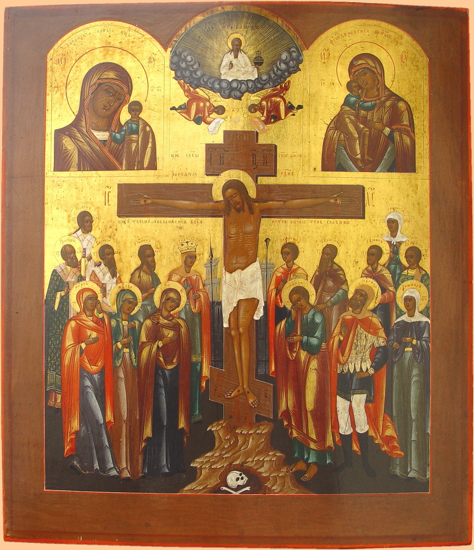 РАСПЯТИЕ ГОСПОДНЕ С ПРЕДСТОЯЩИМИ с Казанской и Феодоровской иконами Божией Матери Центральная Россия, ок. 1850. Дерево, левкас, темпера, золото. 44,5 x 30,8 см. Ikonengalerie Horst R. Schmied, Германия Частное собрание